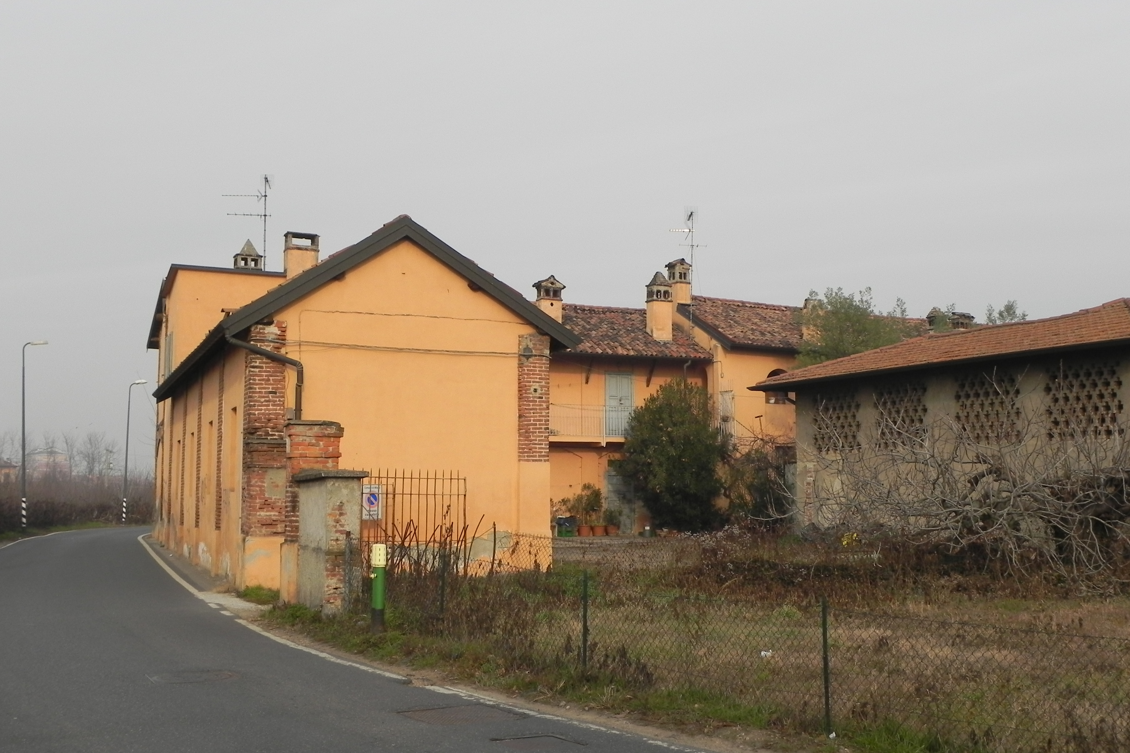 Milano, la Cascina Sant'Ambrogio, a Cavriano.